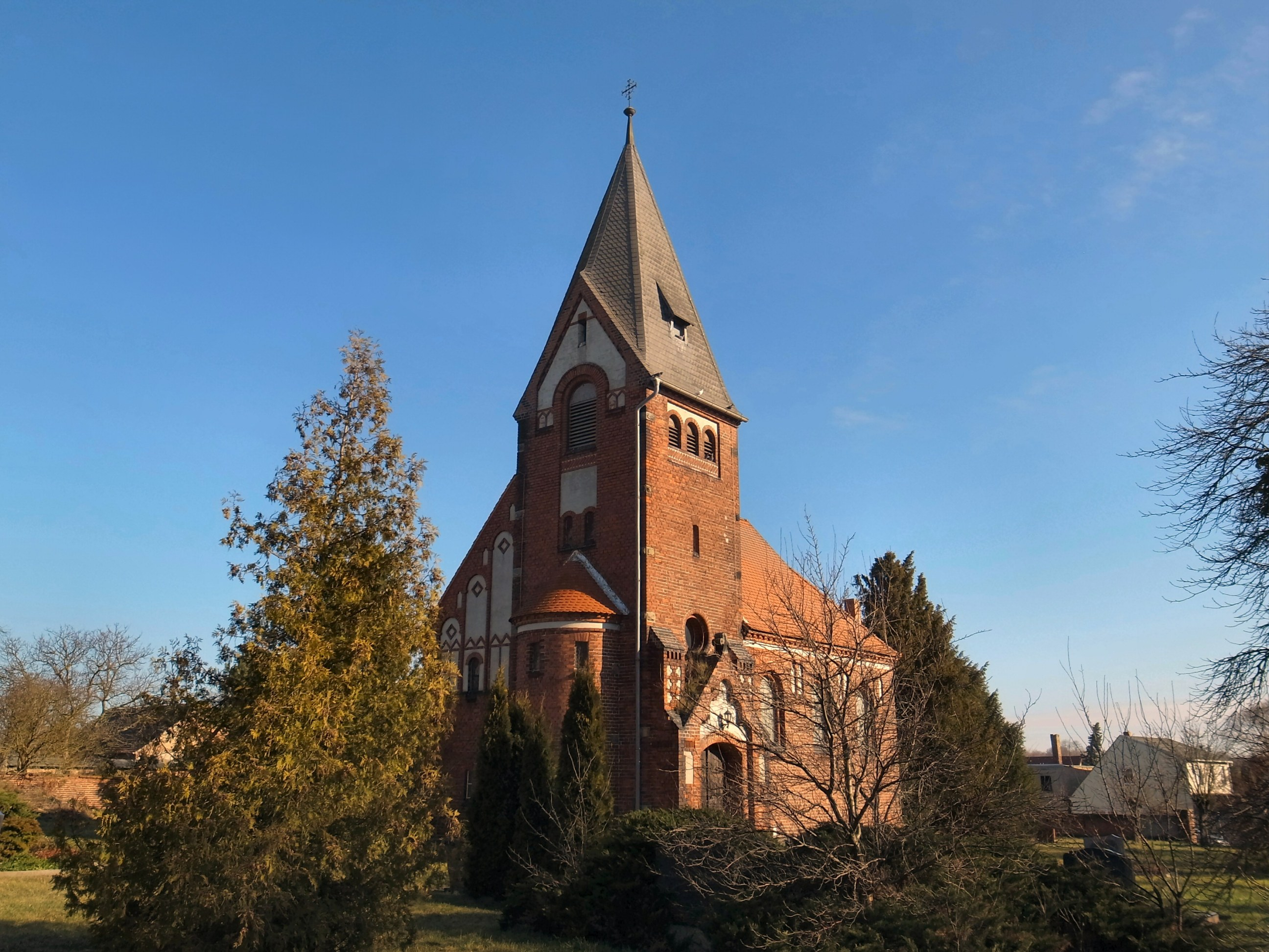 Evangelische Kirche zu Brambach